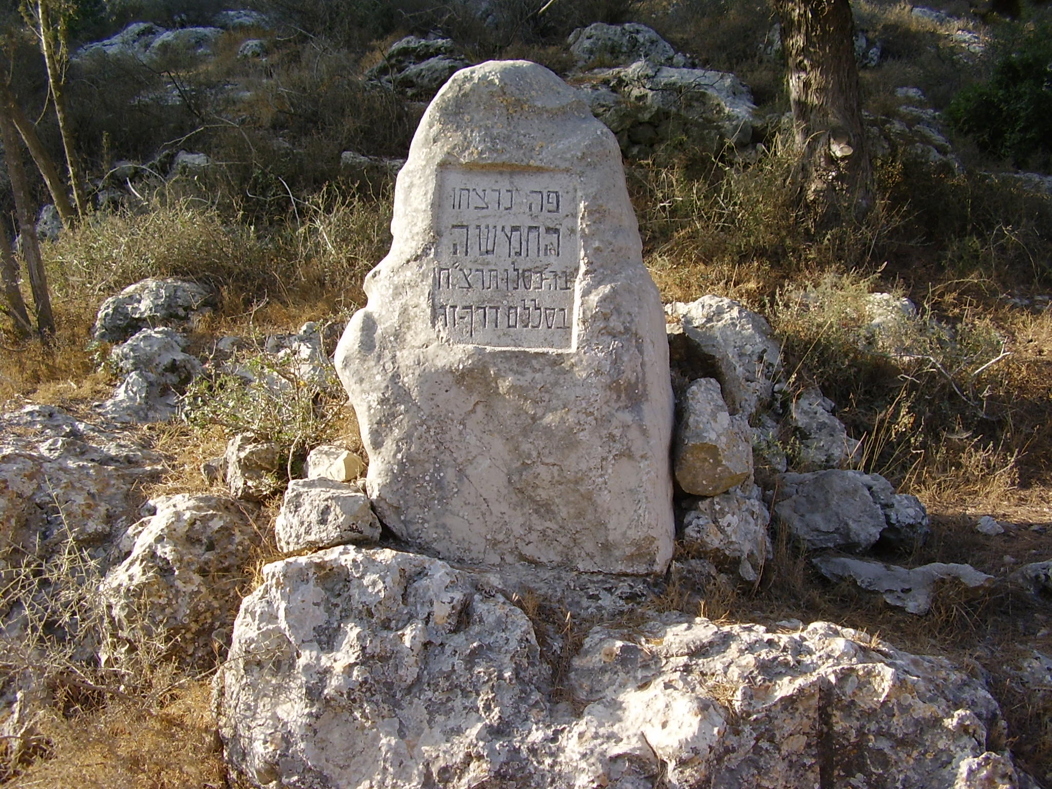 סלע הנצחה במקום נפילת החמישה בהר הרוח.